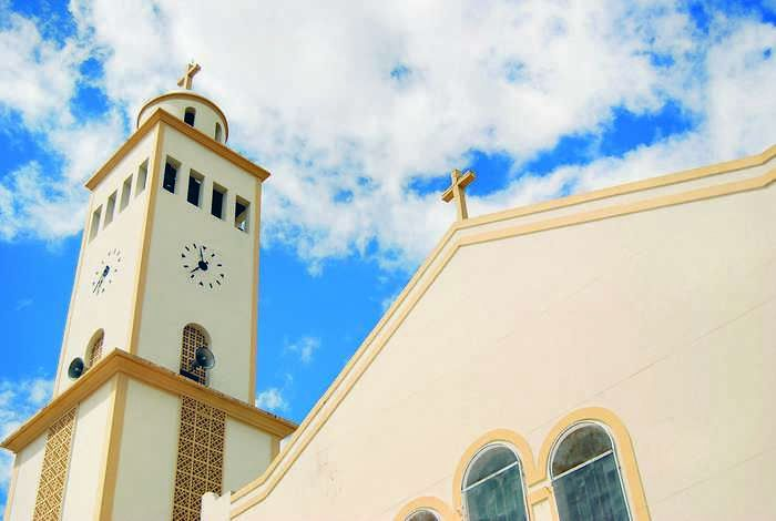 Fachada Igreja Alto da Conceição